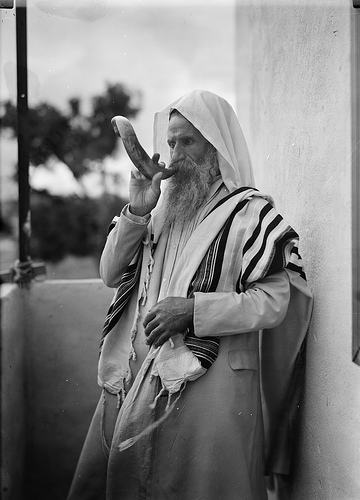 Shofar for the Sabbath Yemenite Jew.صورة لرجل دين يهودي يمني في بدايات القرن العشرين.